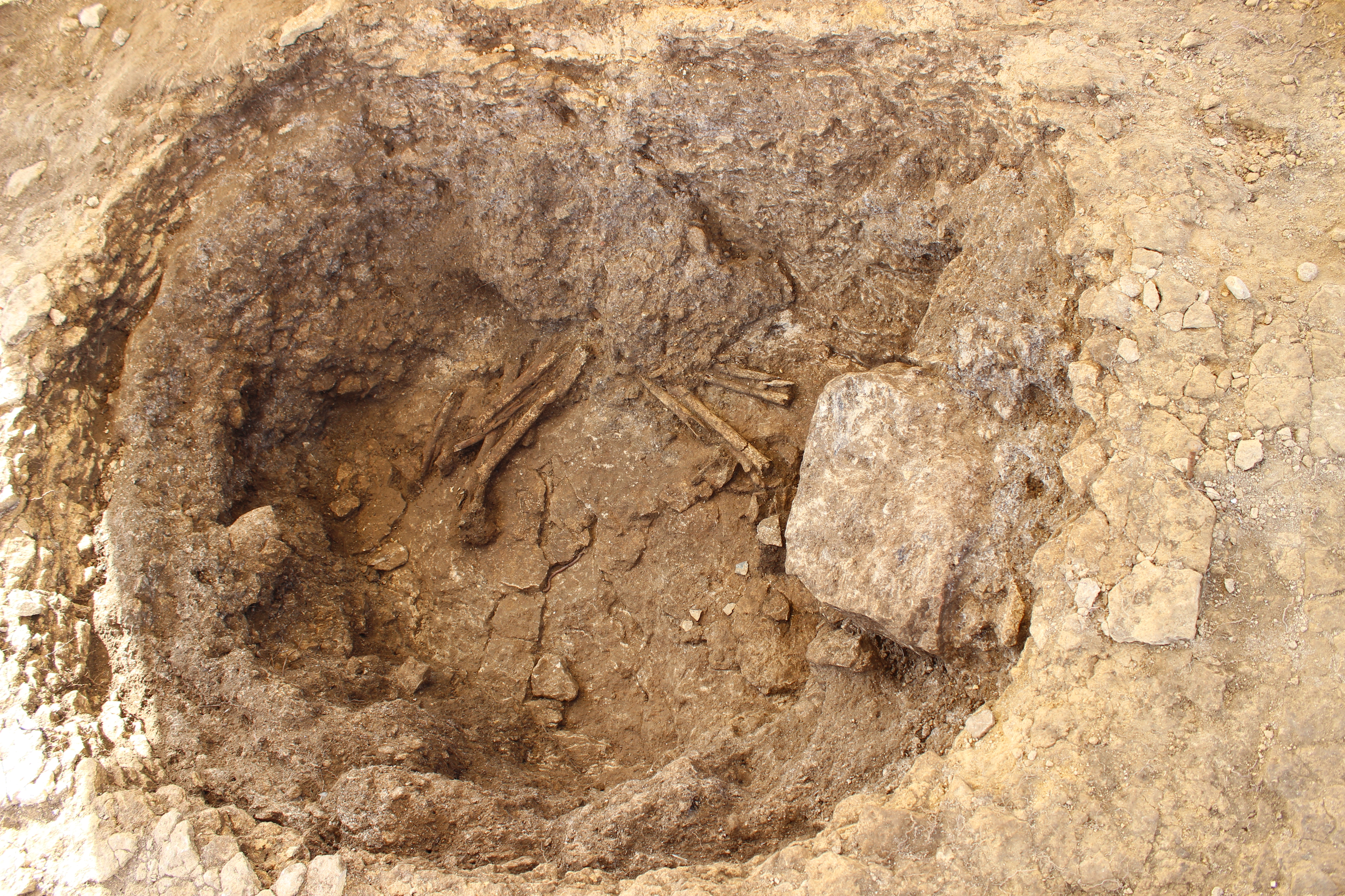 nécropole néolithique